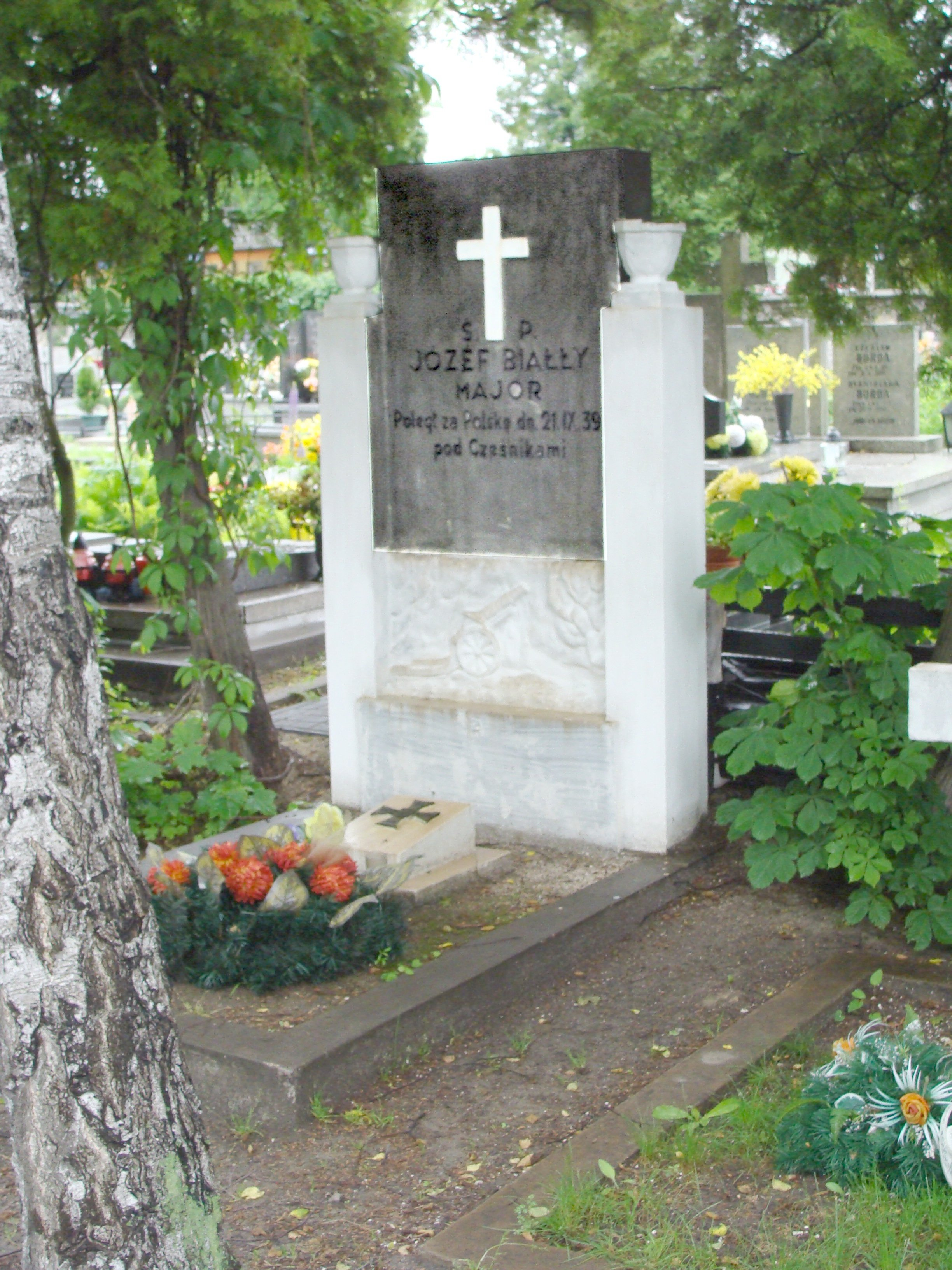 Nagrobek majora Józefa Białłego. Cmentarz przy ul.PeOWiaków w Zamościu